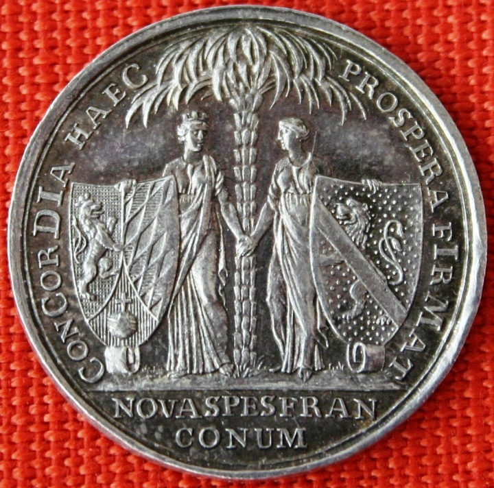 Silbermedaille 1802, auf die Vereinigung des Bistums Bamberg mit Bayern, gewidmet von der Stadt Bamberg. Abschlag von den Stempeln des Dukaten. Bavaria und Franconia mit Wappenschilden reichen sich die Hände, dahinter Palme//Sechs Zeilen Schrift in Kranz, aus Lorbeer- und Eichenzweig gebunden. 23,08 mm; 2,58 g